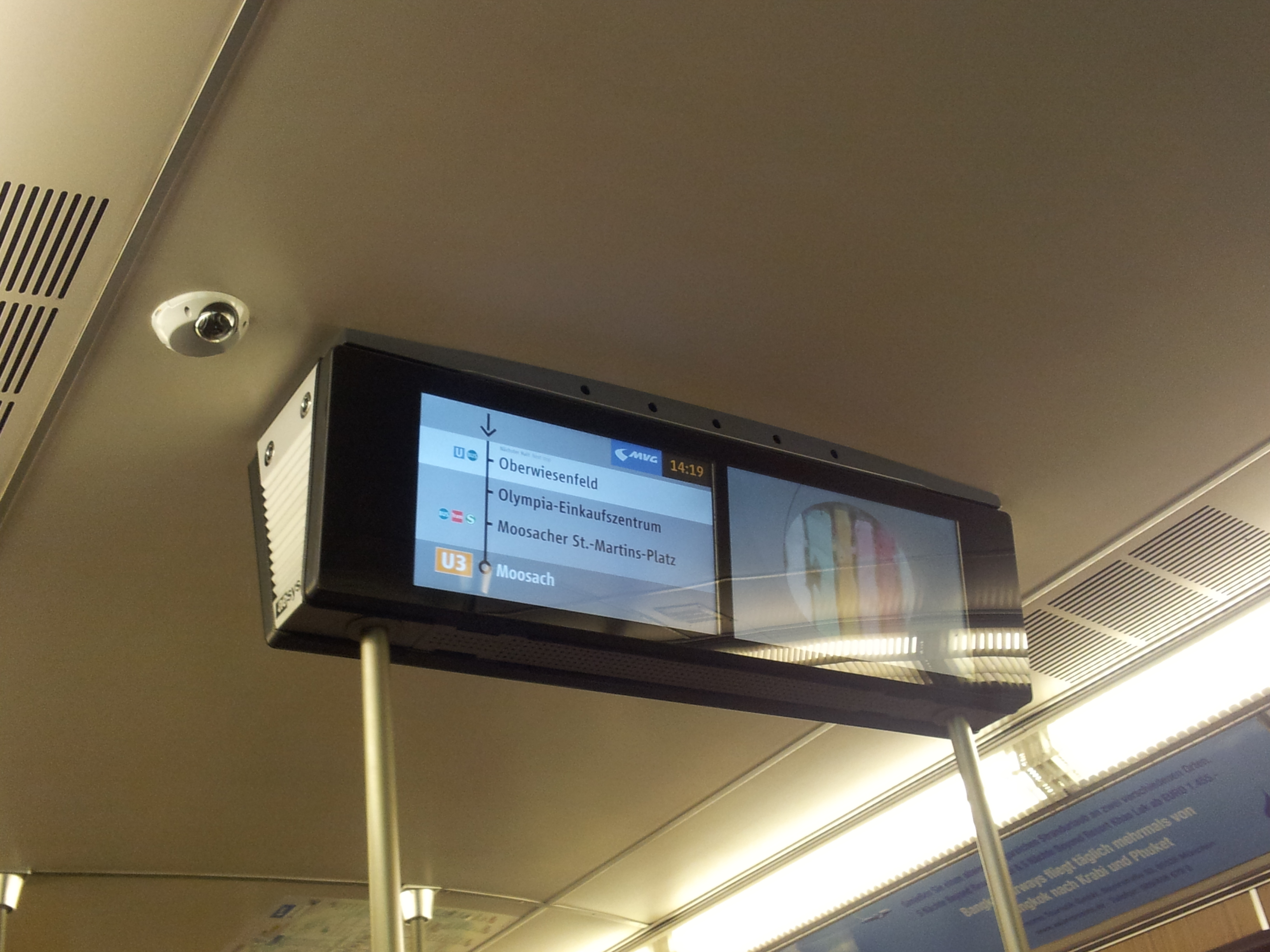 Fahrgastfernsehen